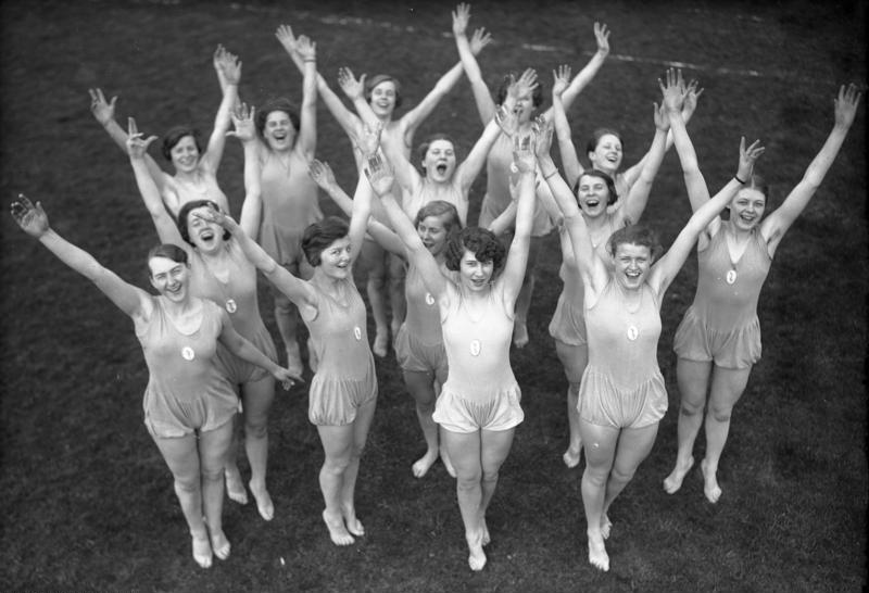 Moderner deutscher Frauensport! In der Logis-Schule in Hannover werden Frauen und Mädchen durch rythmischen Sport zu moderner Körperertüchtigung ausgebildet. Früh um 8 Uhr beginnen bei schönem Wetter die rythmischen Uebungen im Tanzen und Springen, um den Körper Grazie und Anmut zu verleihen. Kaum morgens aufgewacht und schon so lustig , vor ihren Uebungen.